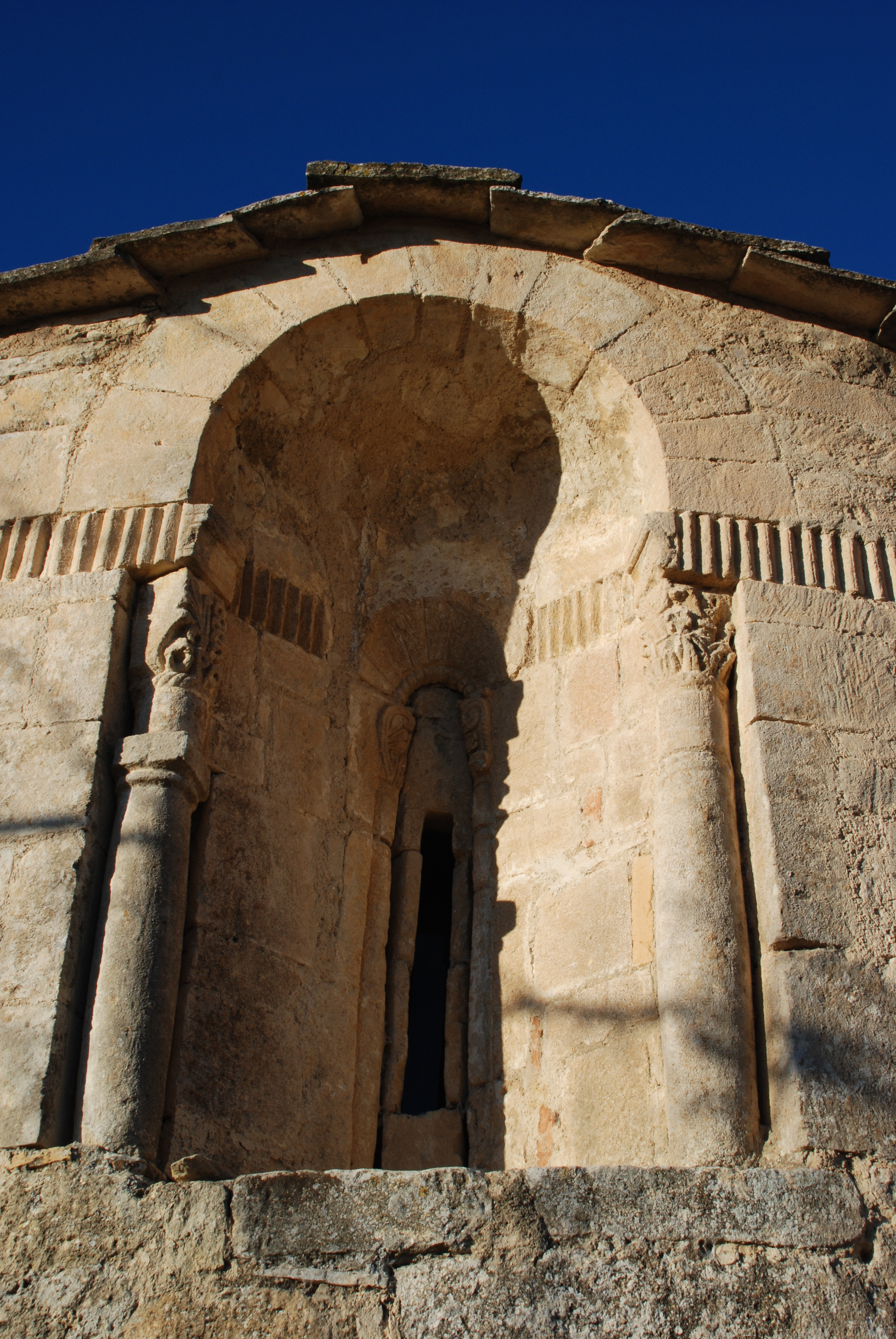 France - Provence - Chapelle Saint-Pierre de Pierrerue